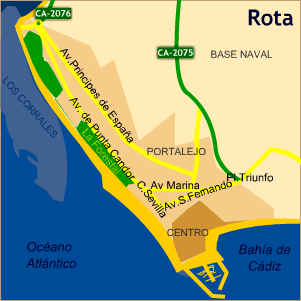 mapa de rota